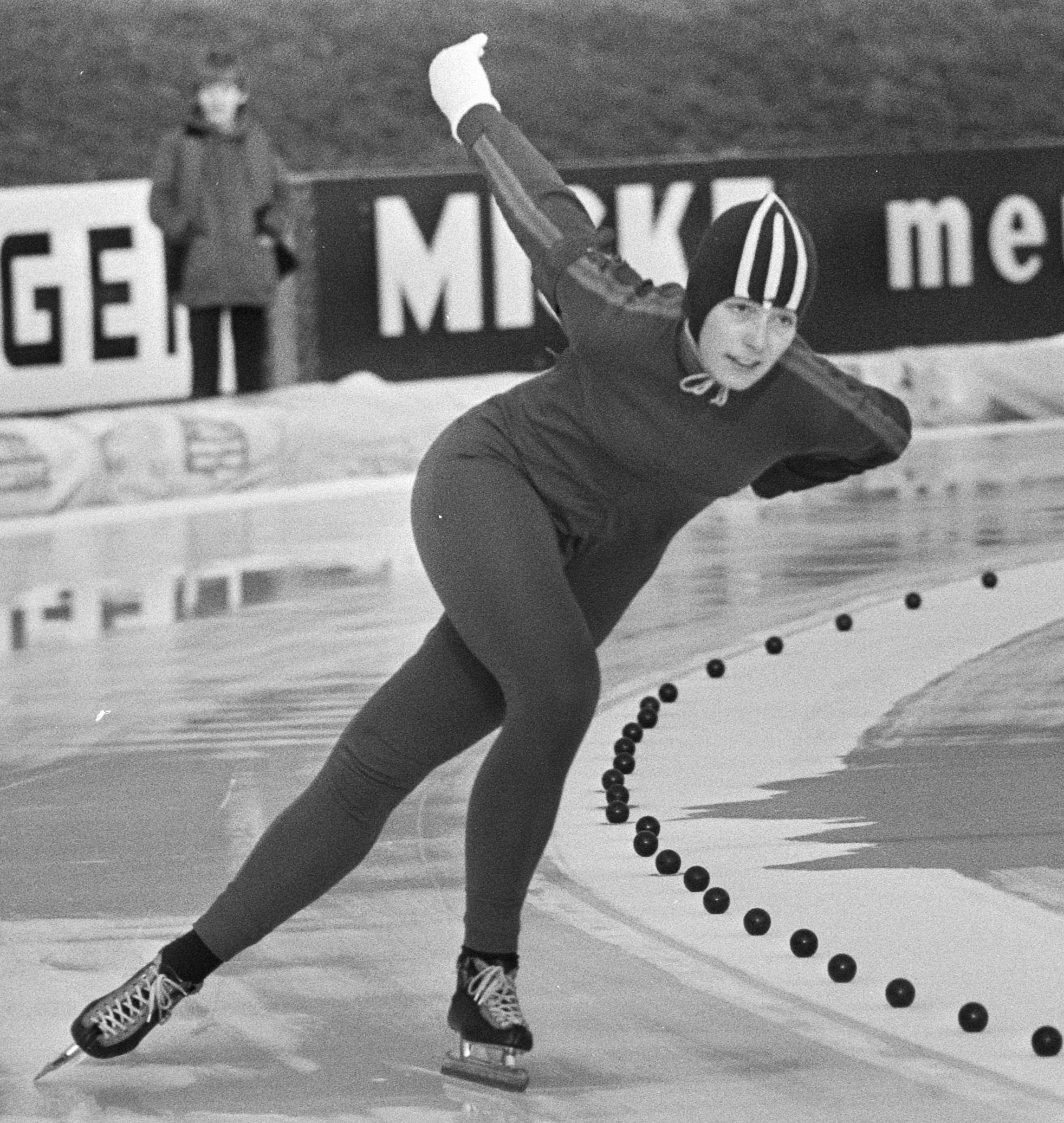 Schaatsinterland Nederland tegen USSR in Assen; Sijtje van de Lende in aktie.